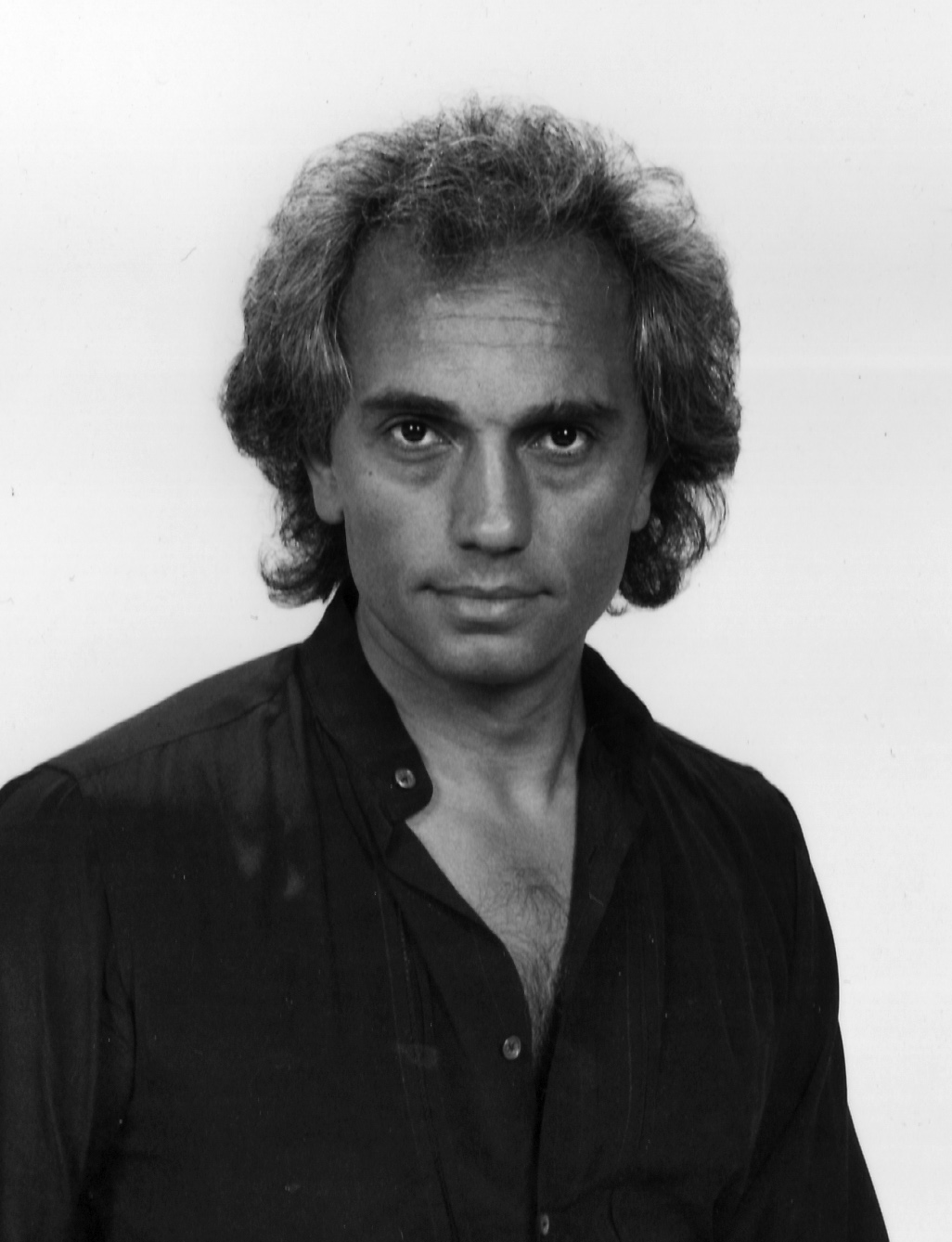 Жан Татлян, Лас-Вегас, 1982